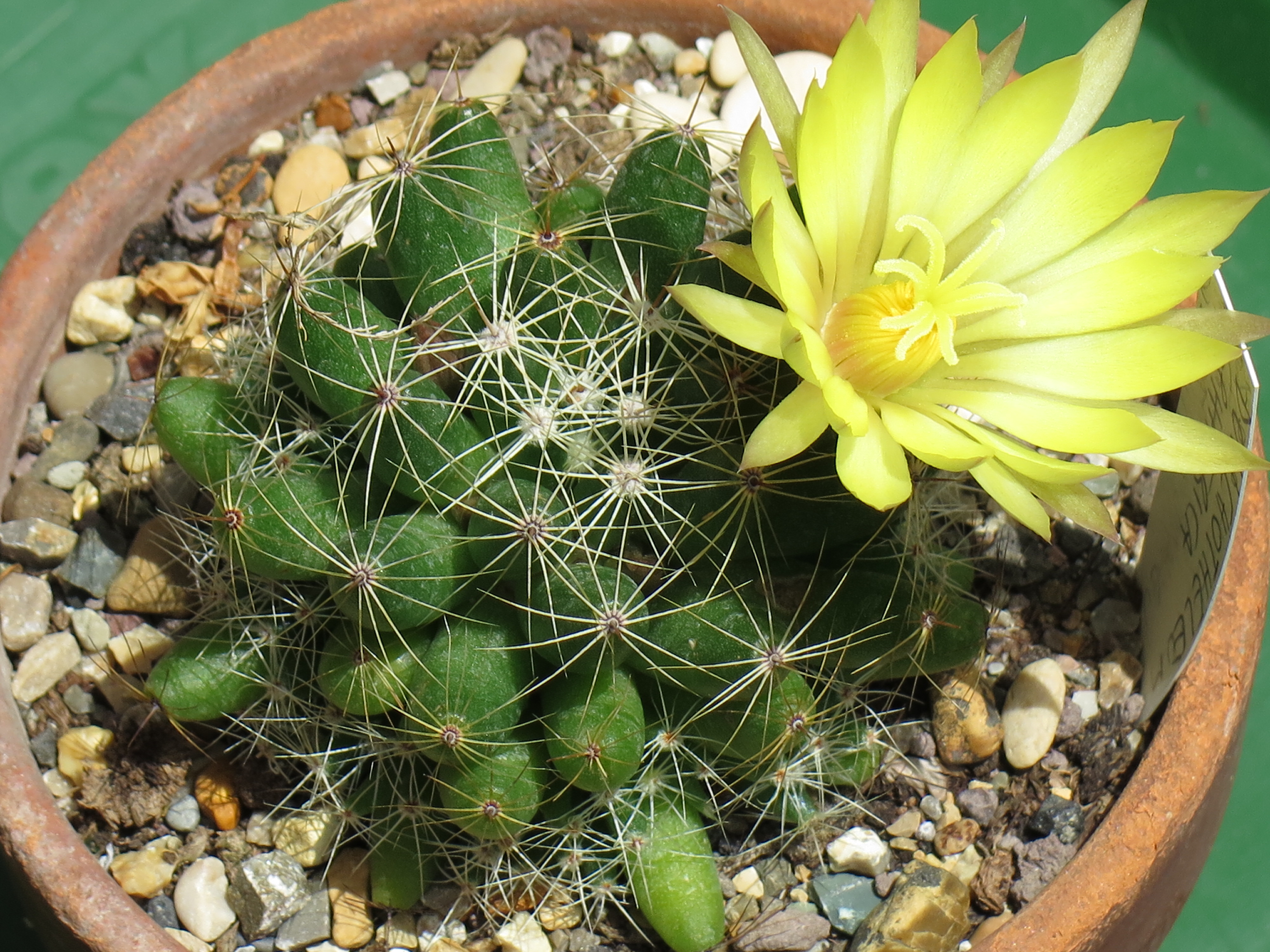 Mammillaria longimamma var. sphaerica in fiore